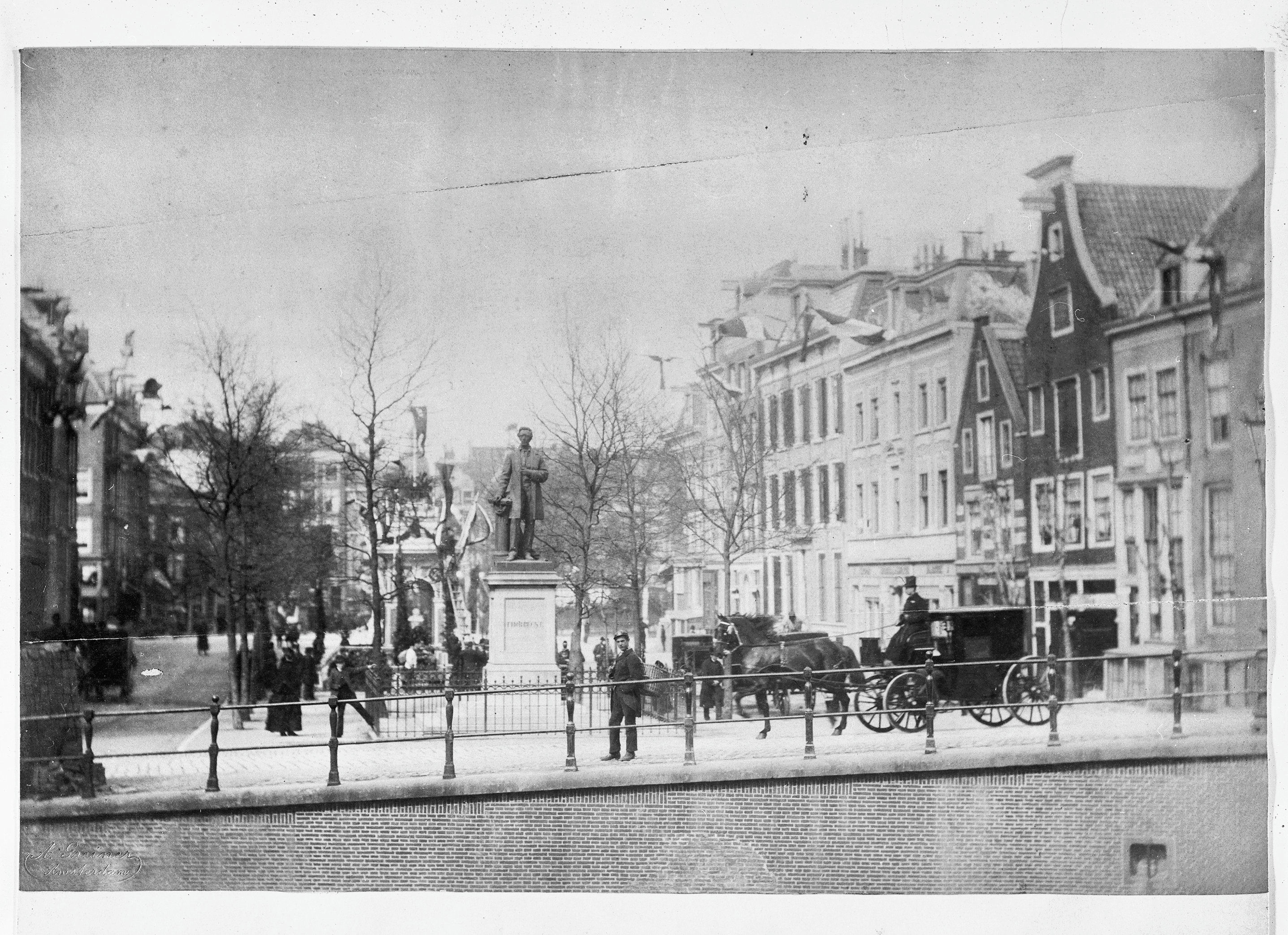 overzicht